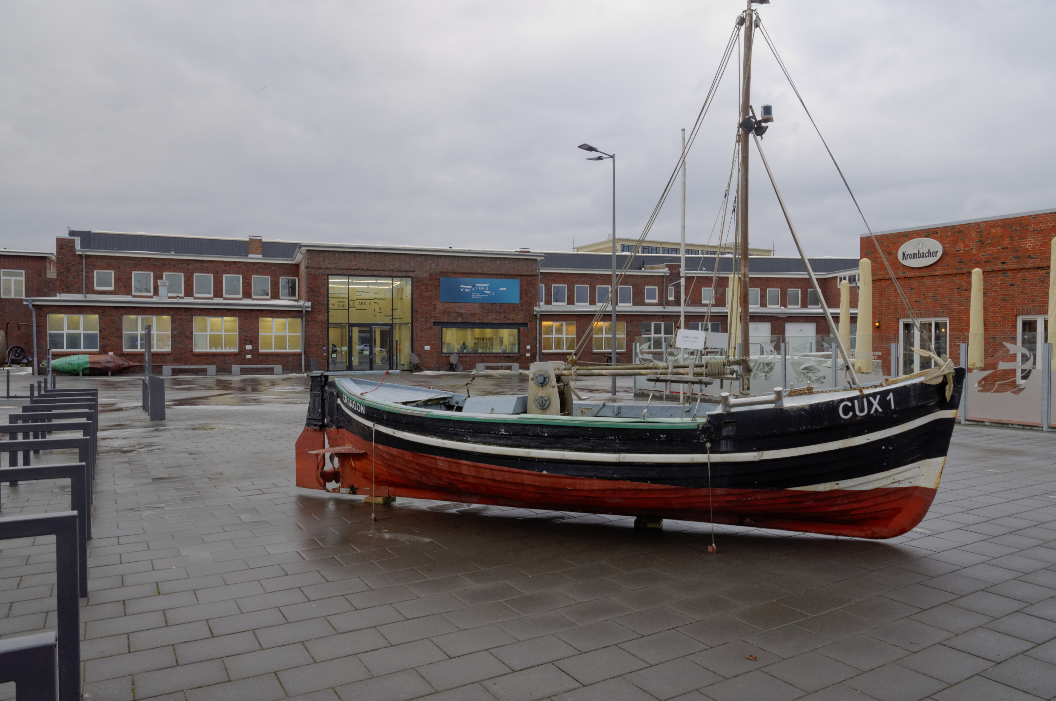 Bilder für die Organisation der AdminCon 2016